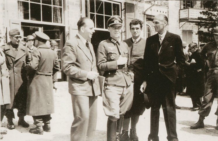 vlnr.: ?; Bogislaw von Bonin (* 17. Januar 1908 in Potsdam; † 13. August 1980 in Lehrte), deutscher Wehrmachtsoberst (SS-Sonderhäftling); Ortsbürgermeister; Sigismund Payne Best (* 14. April 1885 in Cheltenham; † 21. September 1978 in Calne), engl. Secret Intelligence Service (SS-Sonderhäftling) vor Hotel Pragser Wildsee (Südtirol)